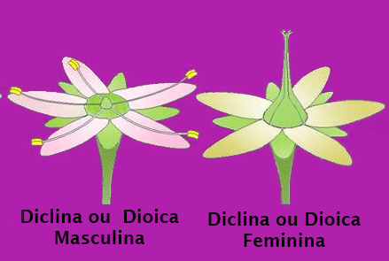 Flores diclinas ou dioicas masculina e feminana.